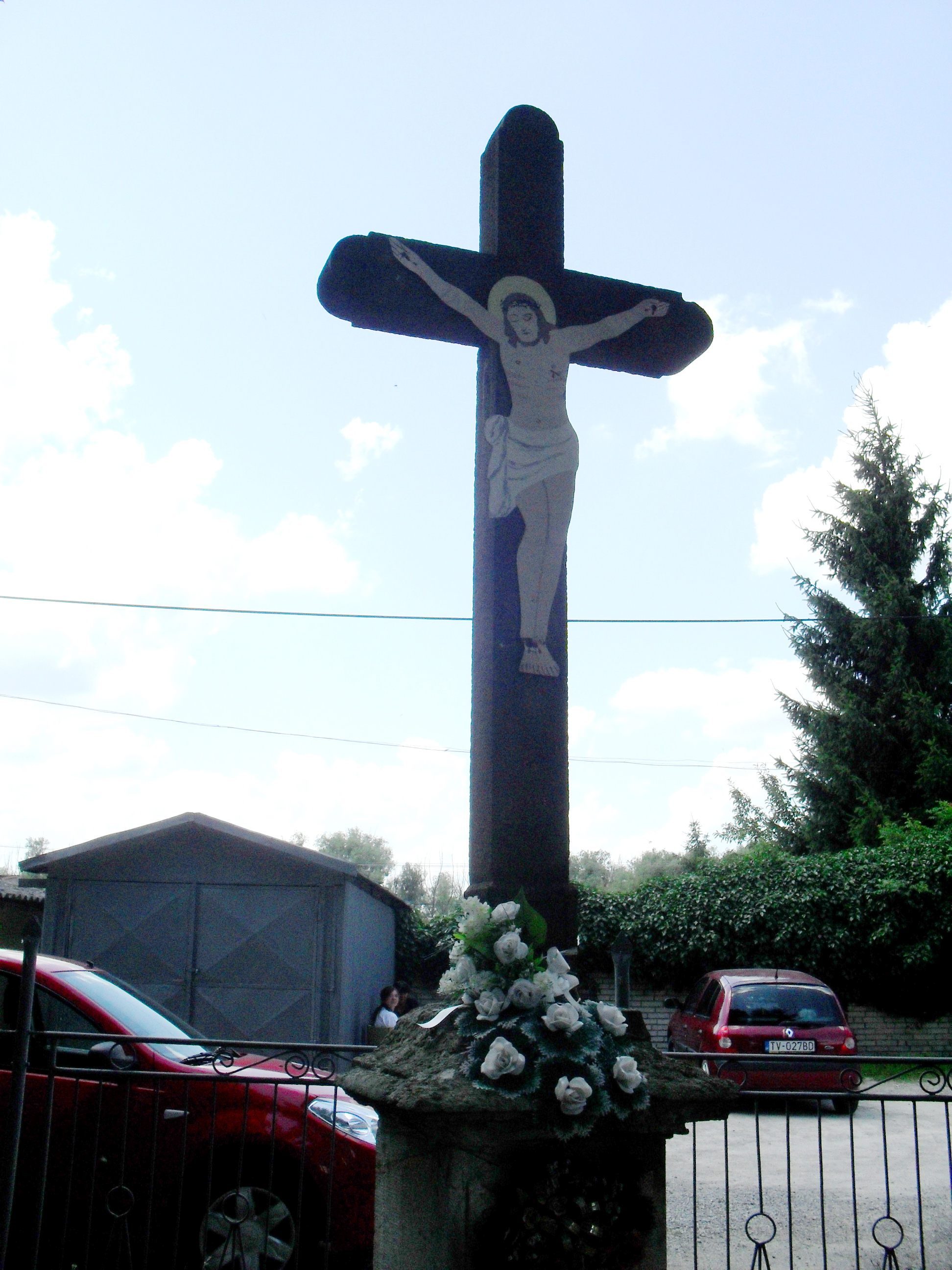 Bodrogszerdahely - útmenti kereszt a görög katolikus templom mellett